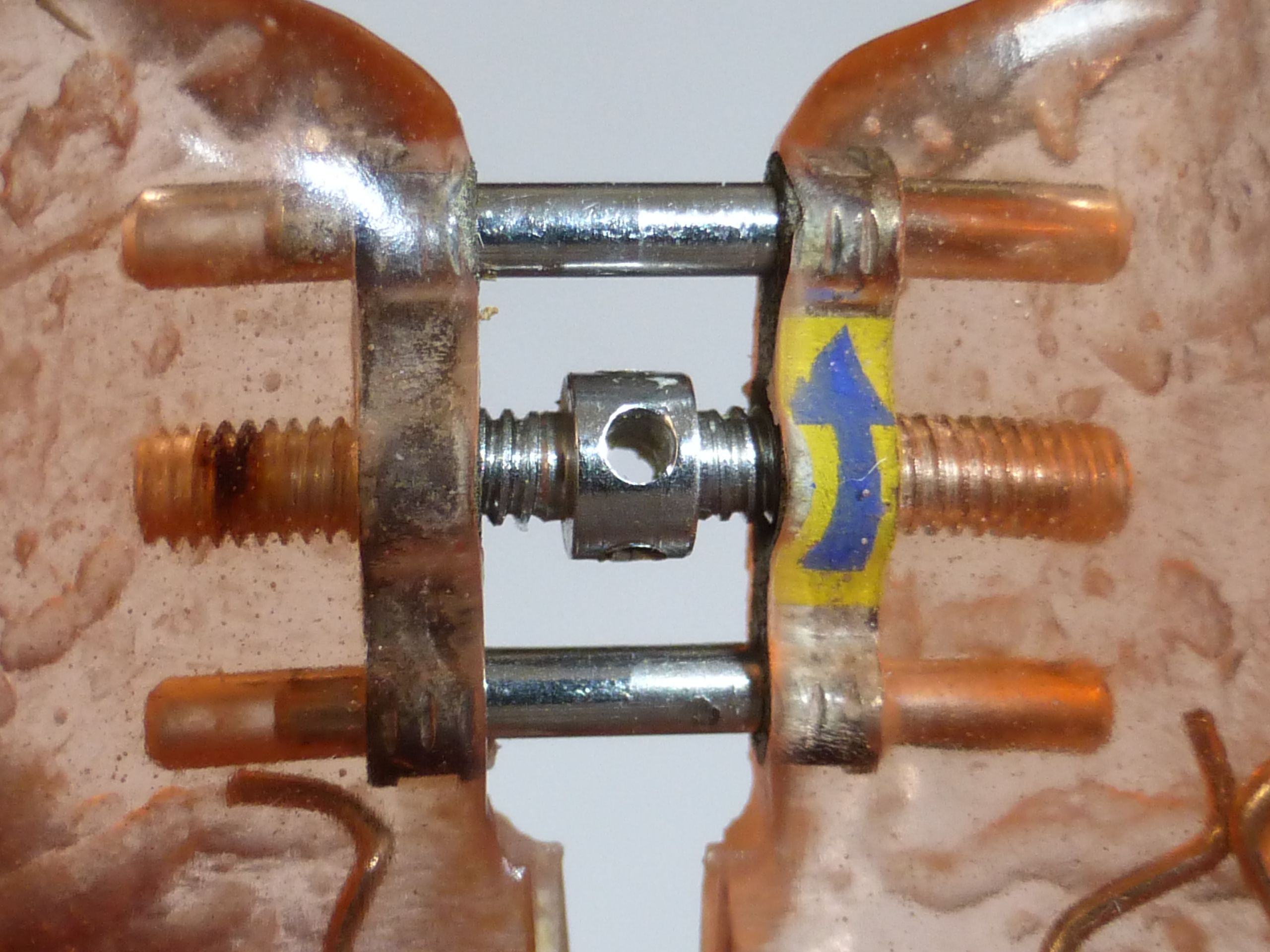 Verstelleinrichtung einer herausnehmbaren verstellbaren Zahnspange ("Aktive Platte"), 1980er Jahre